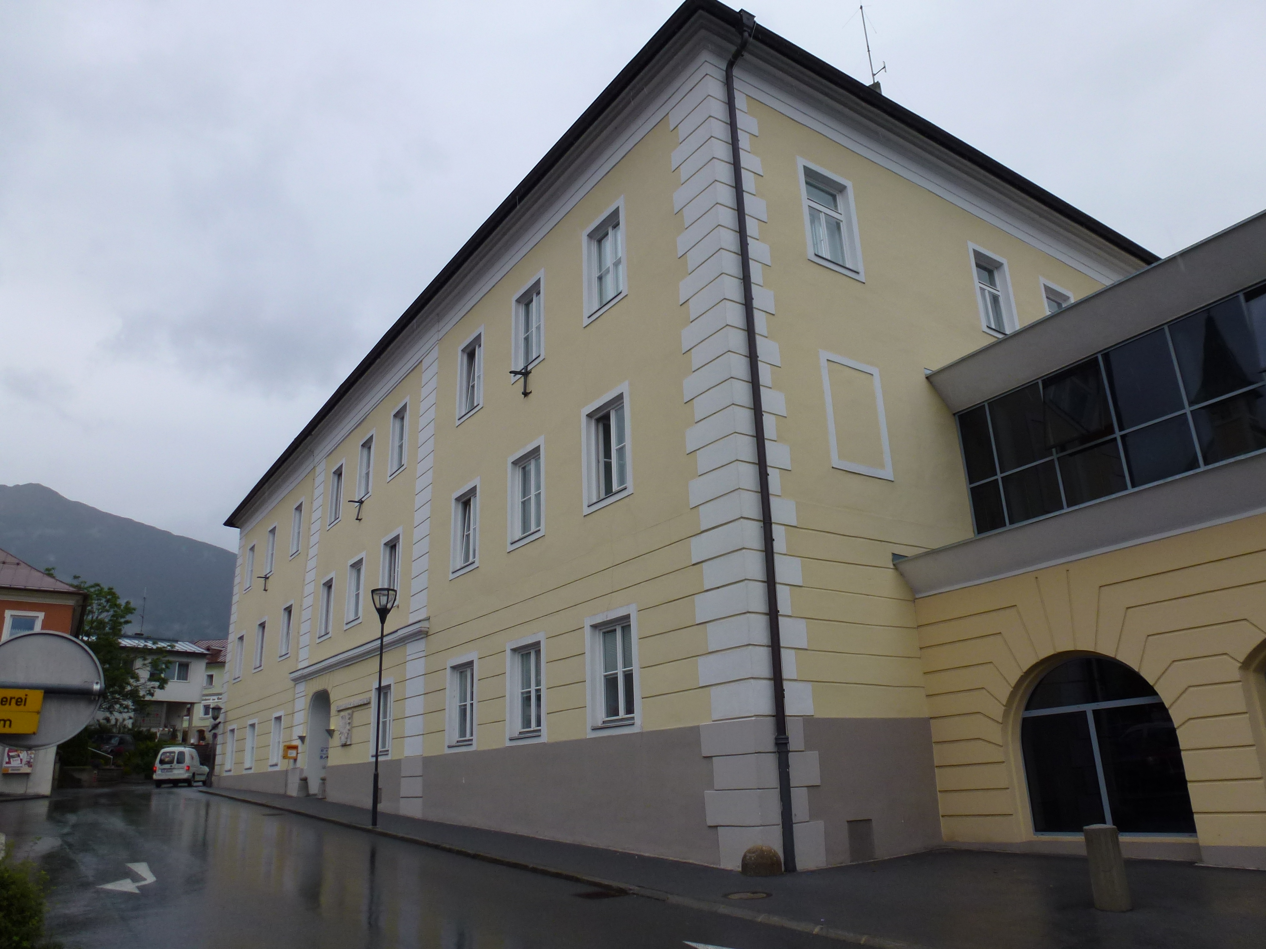 Ehem. Burg und Schloss Rofenstein, Bezirkshauptmannschaft - Stadtplatz 1, Imst